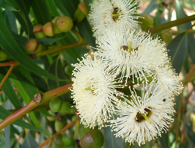 Ubiquitous Tuart blossoms (Eucalyptus gomphocephala)